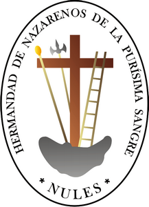 Escudo de la Hermandad de Nazarenos de Nules